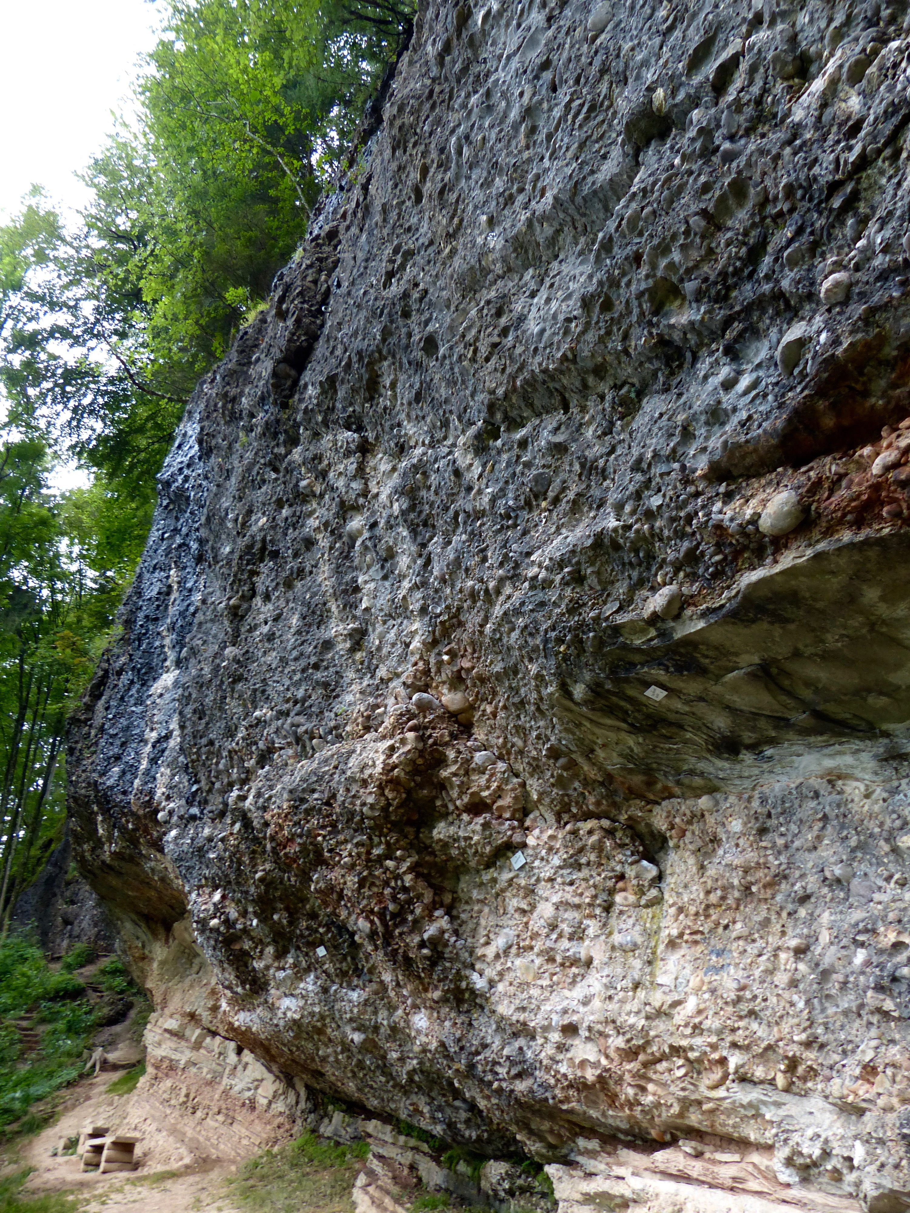 WikiProjekt Landstreicher 2016: Geotop Molassewand NW Seltmans: Nagelfluh (Obere Süßwassermolasse), genutzt als Klettergarten